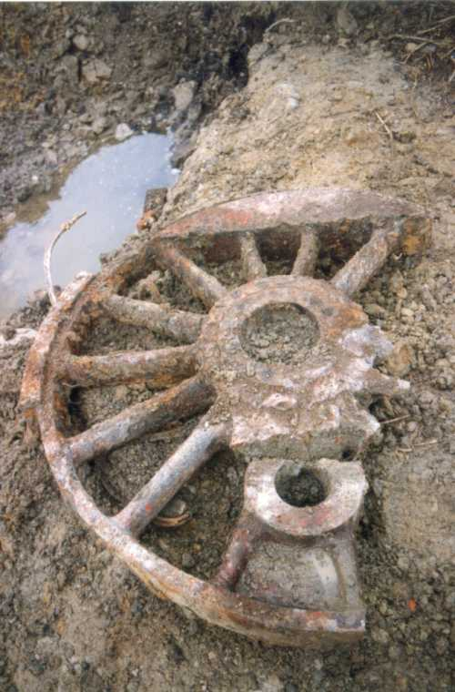 Das ausgegrabene Rad einer Dampflokomotive, Bilderspende von P. Dr. Daniel Hörnemann OSB Abtei Gerleve, copyright: GNU FDL